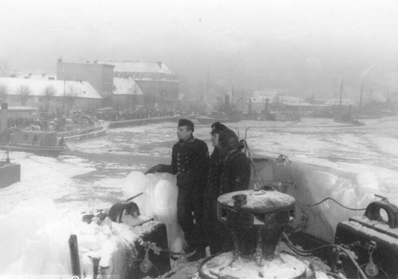 Hafen von Pillau Pillau, den 26.1.1945